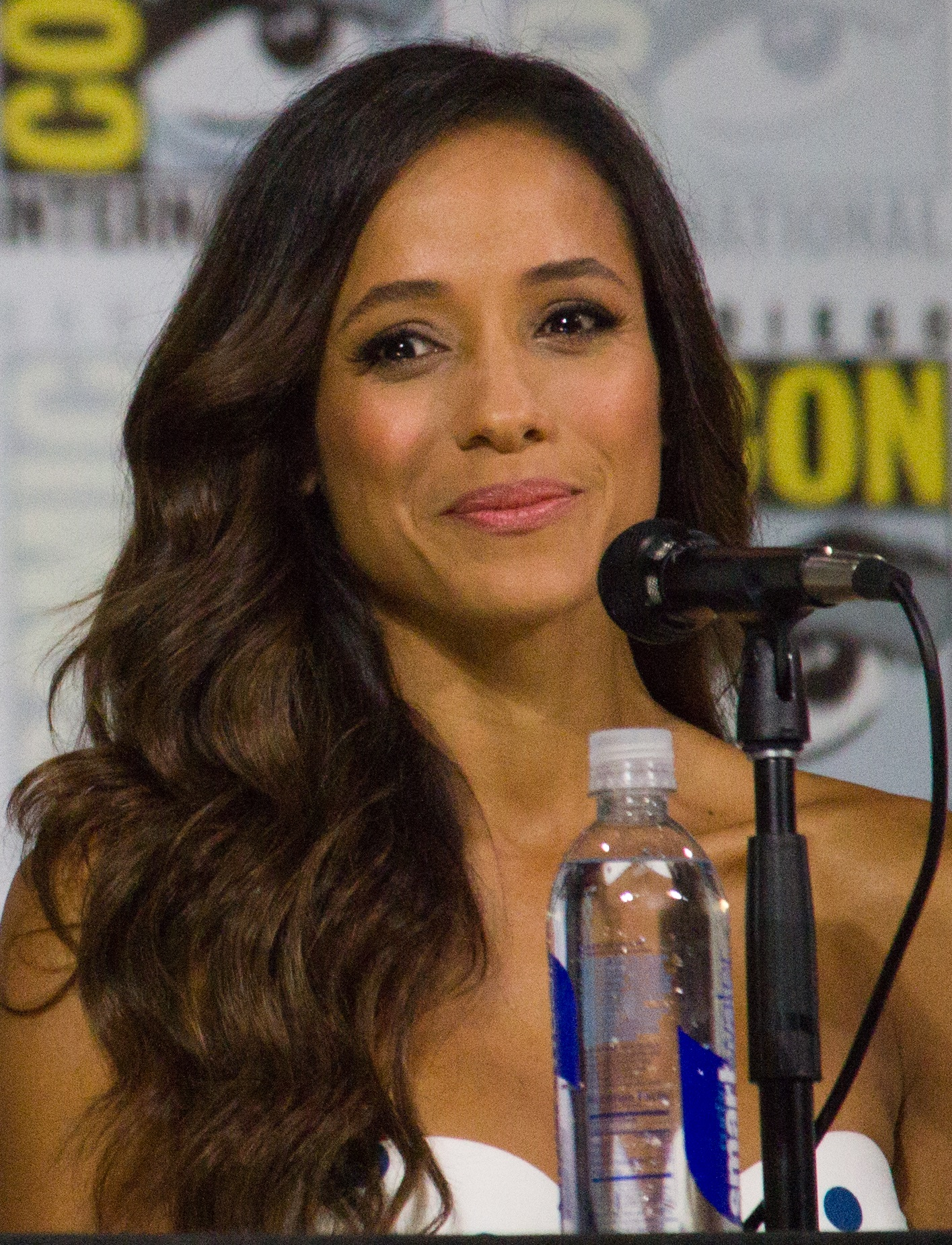 Dana Ramirez Comic Con 2017